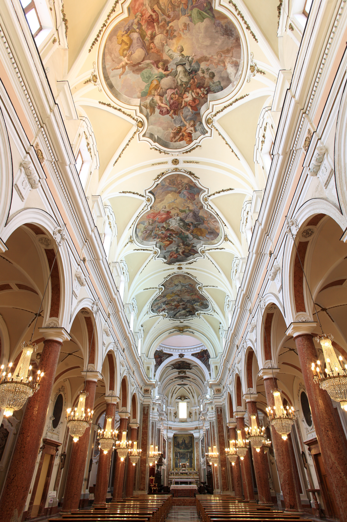 Navata Centrale, affreschi del pittore fiammingo Guglielmo Borremans (XVIII sec.)